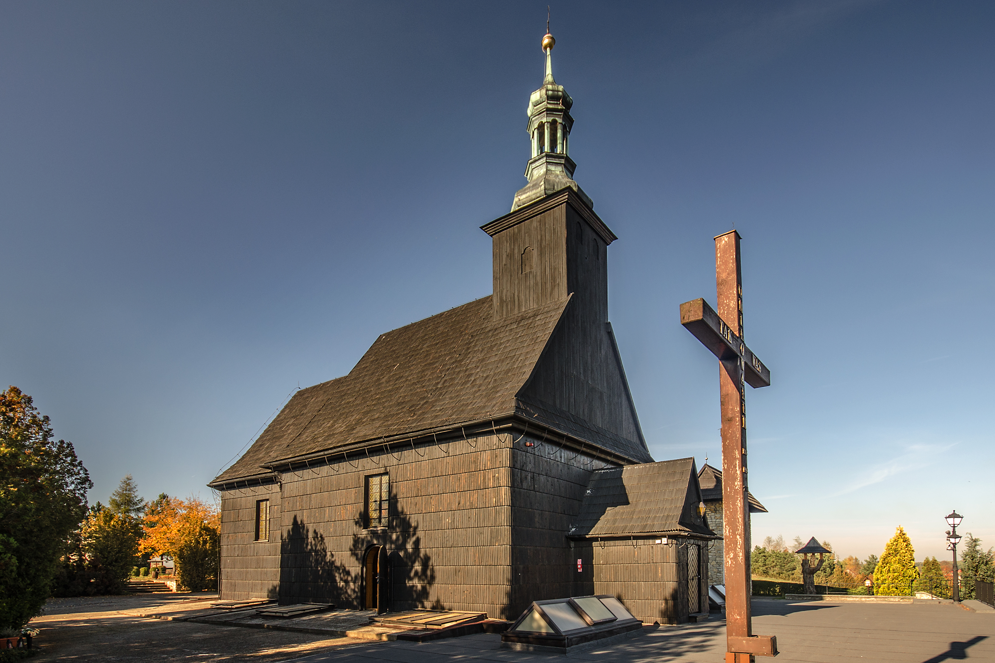 Malnia, kościół ewangelicki ob. rzymsko-katolicki par. p.w. św. Franciszka, 1801-1804, 1976